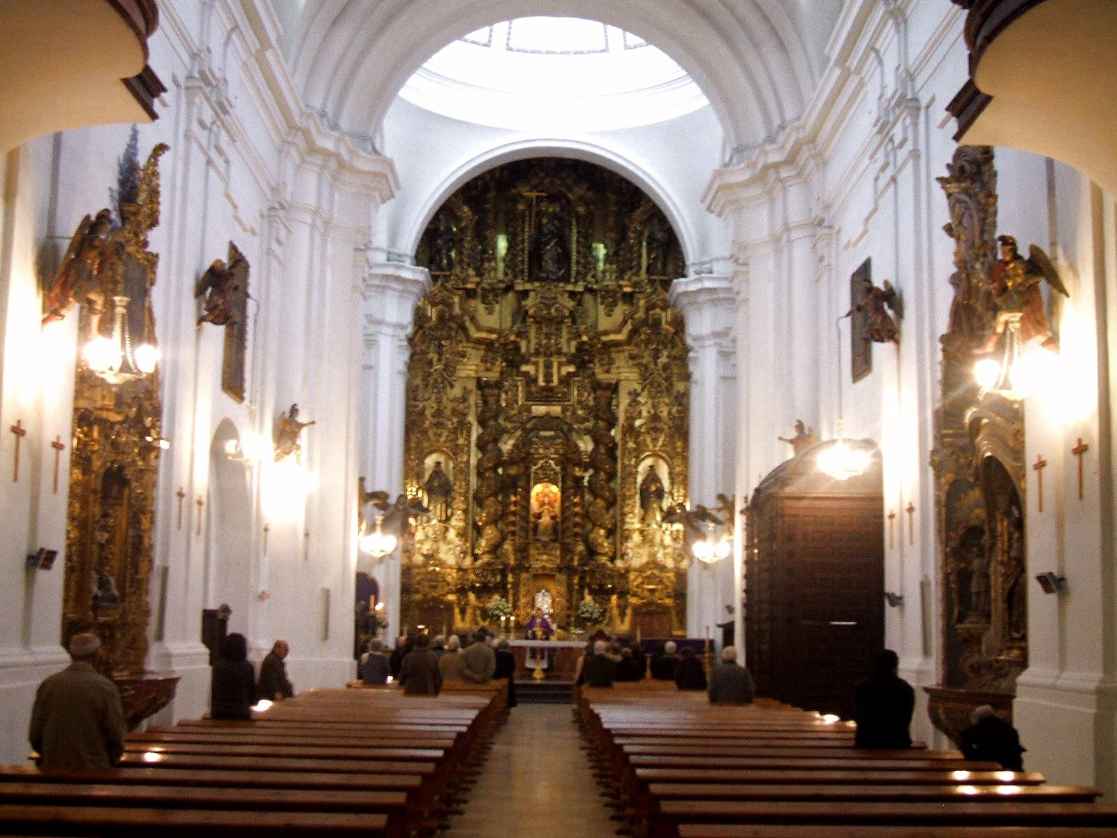 Iglesia de la Santísima Trinidad, Córdoba (Andalucía; España)